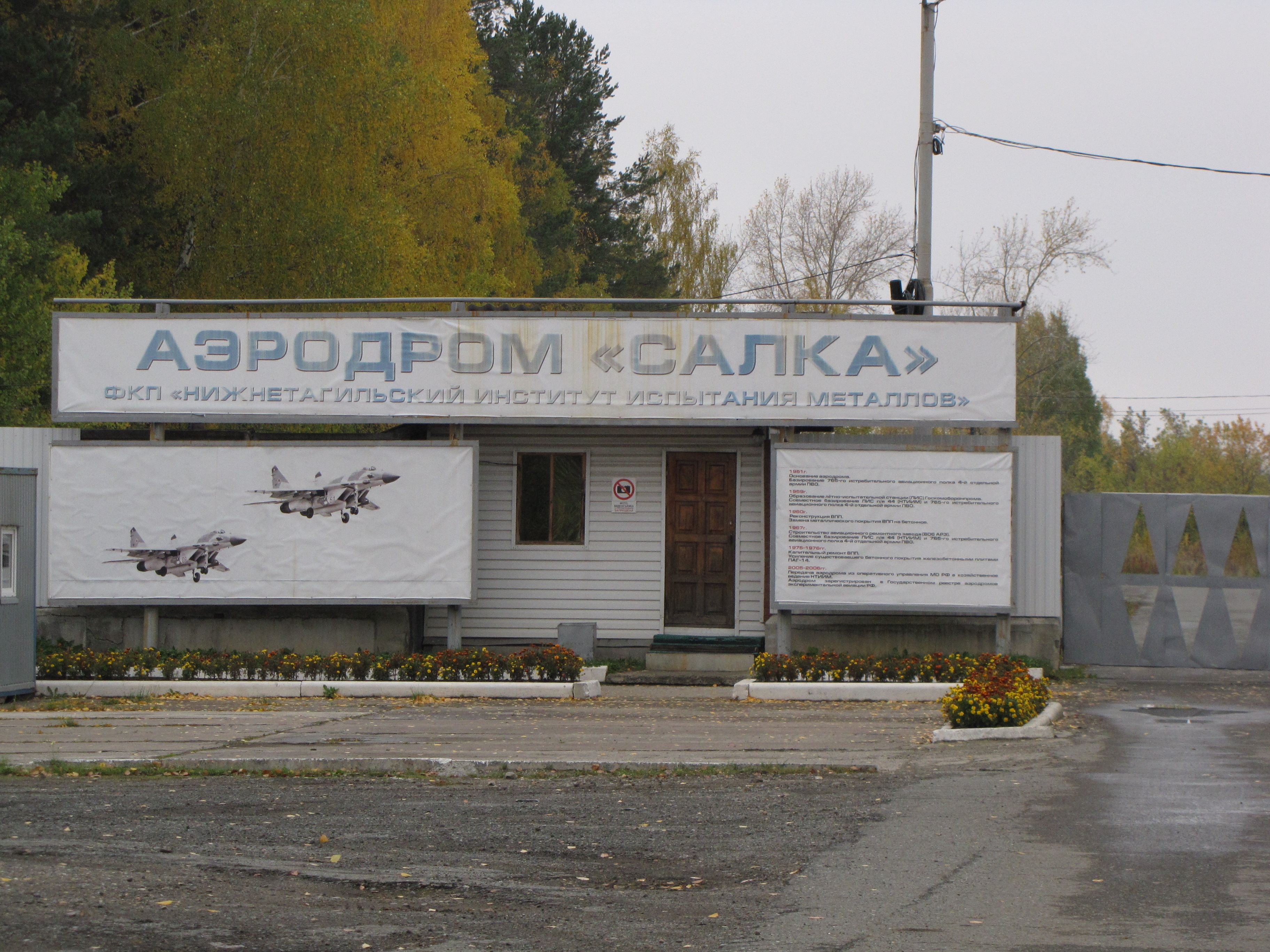 КПП Аэродром "Салка"